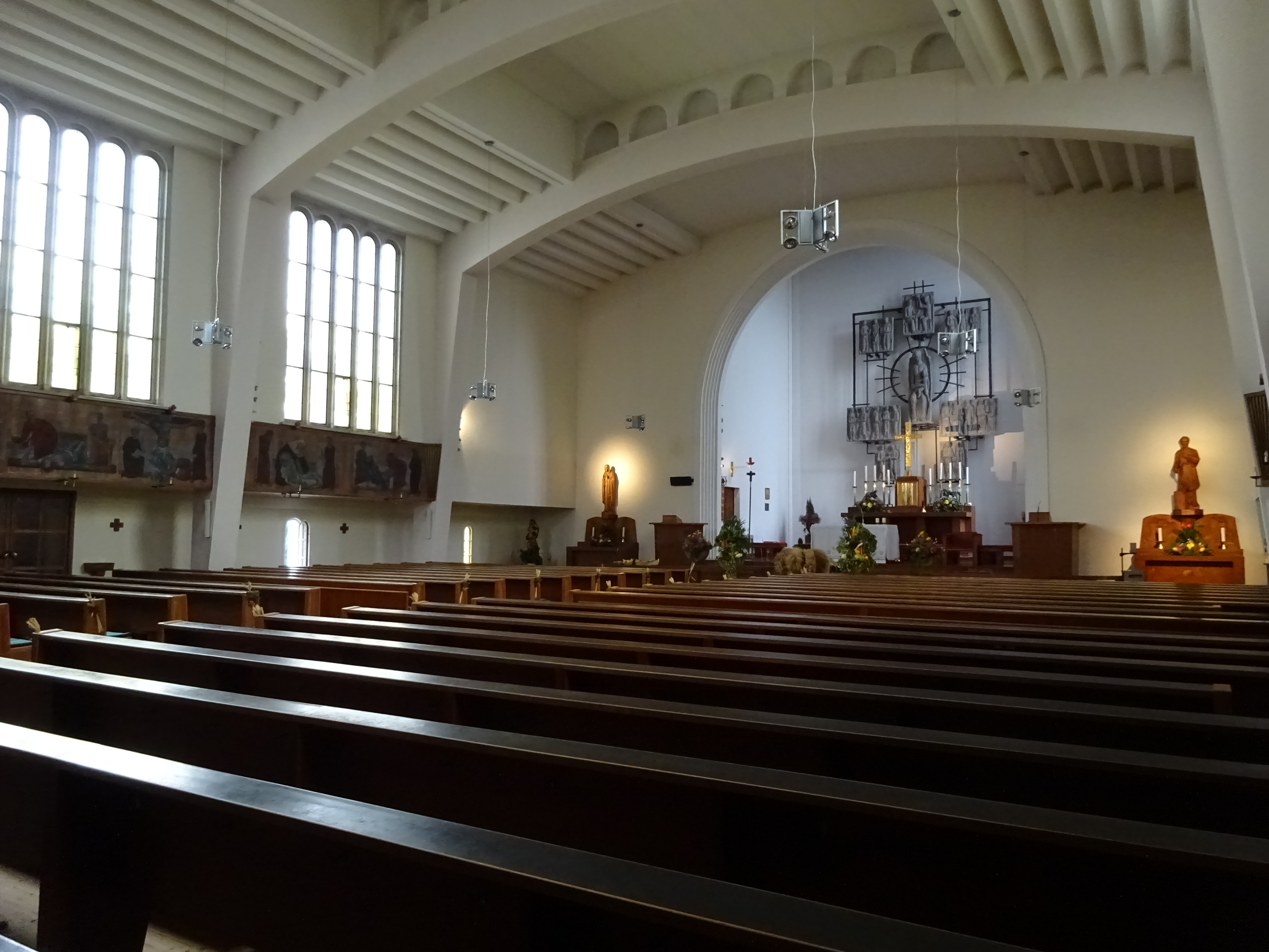 Kath. Pfarrkirche hl. Maria von der immerwährenden Hilfe